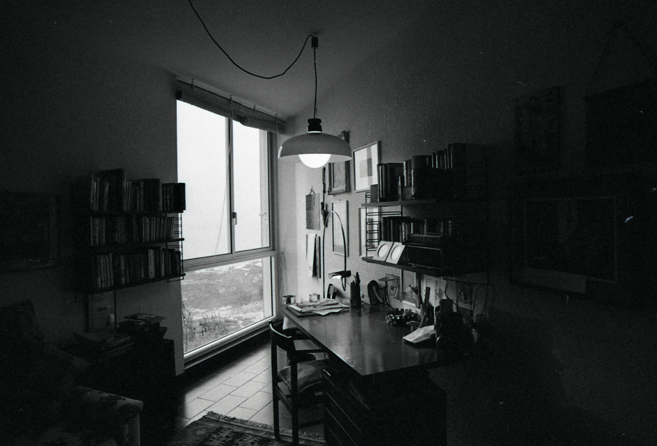 Servizio fotografico : Imperia, 1981 / Paolo Monti. - Strisce: 7, Fotogrammi complessivi: 35 : Negativo b/n, gelatina bromuro d'argento/ pellicola ; 35 mm. - ((Sul portanegativi: N[I]K[MA]T-EL FP4. . - Considerando i soggetti contenuti nei fotogrammi delle serie immediatamente precedenti si può ragionevolmente supporre che l'indicazione riportata da Monti sul portanegativi riguardo i fotogrammi contenuti nel contenitore in questione sia errata; la villa potrebbe quindi essere di proprietà dell'editore Franco Maria Ricci e non del motociclista Fausto Ricci. - Fonte: Agenda di Paolo Monti: Nikon Leika 3001-/ Monti 1978 (1978-1982), presso Archivio Paolo Monti